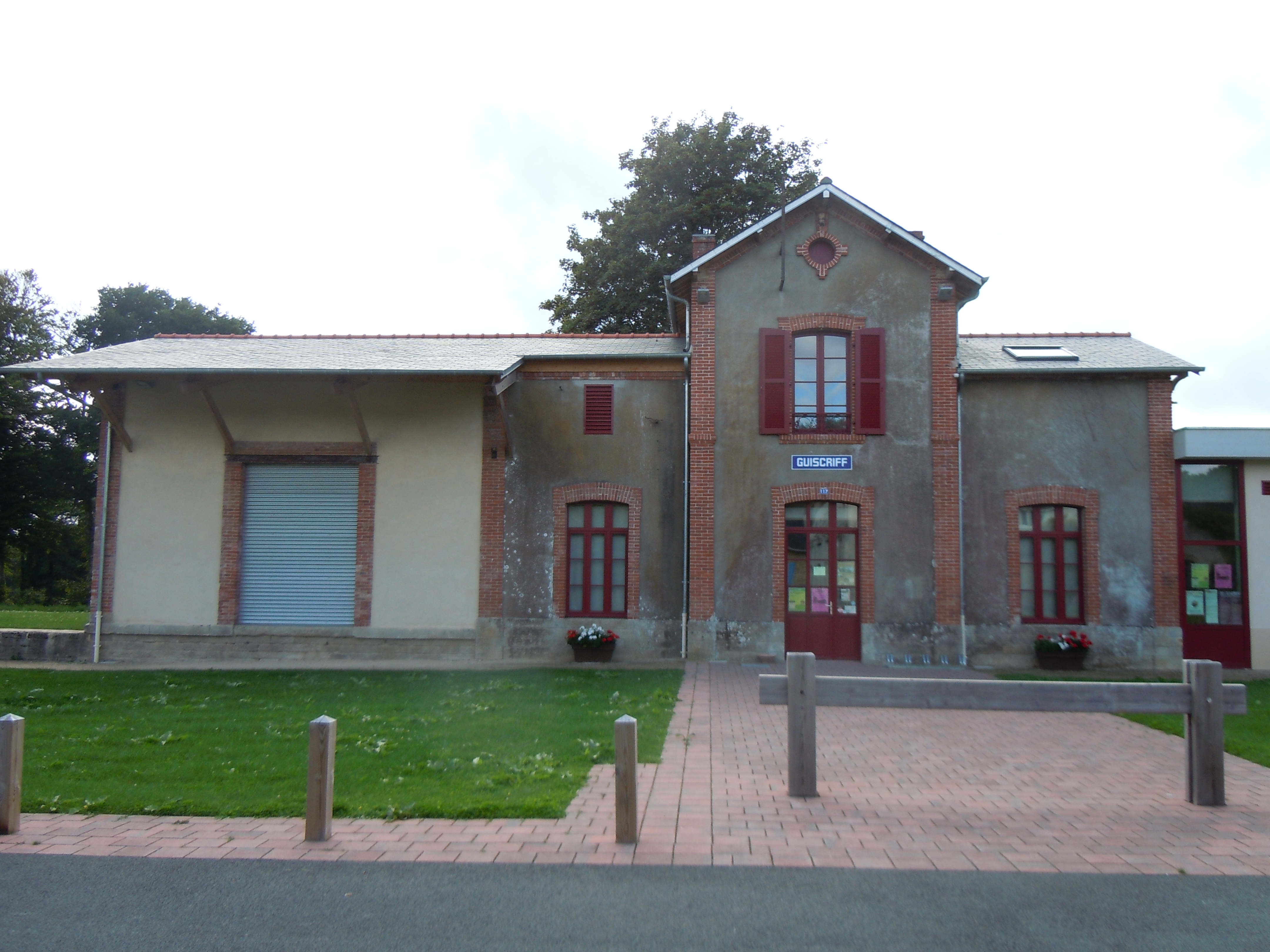 bâtiment de l'ancienne gare de Guiscriff, département du Morbihan, France